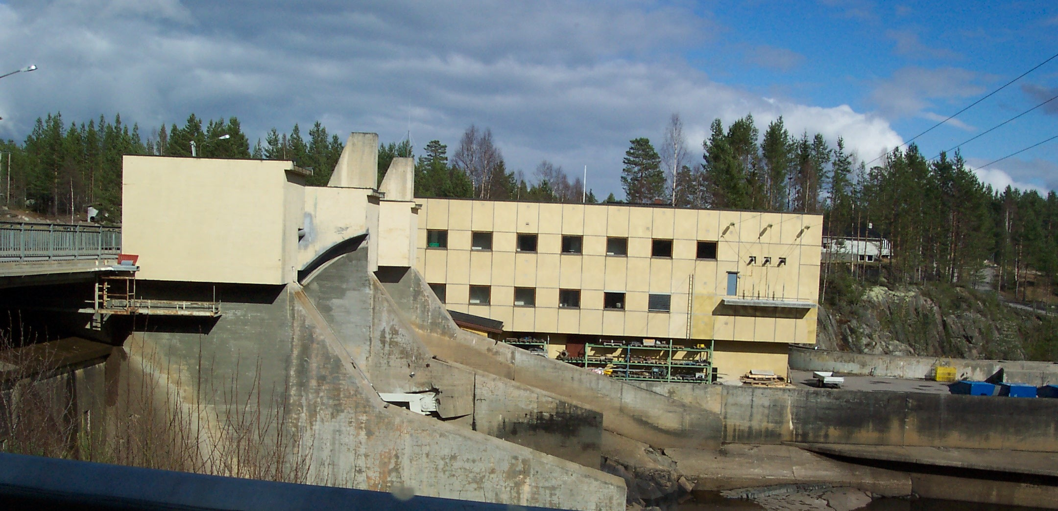 Lutufallet kraftverk våren 2005